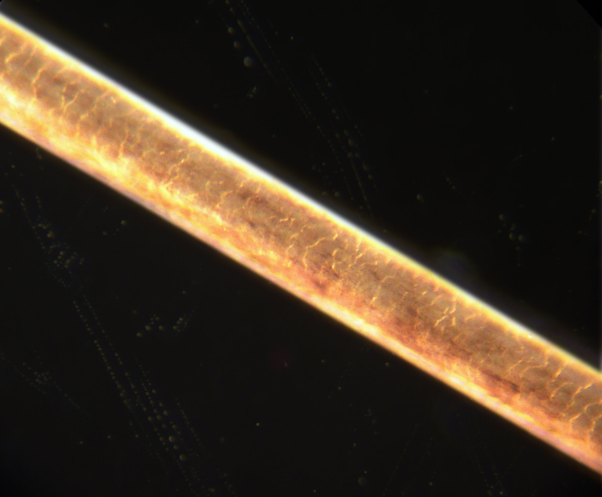 Menschenhaar bei 200 fach (Aufnahme senkrecht von oben!). Ausschnitt ca: 600µm x 400µm